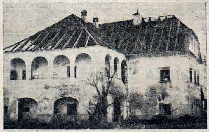 Dvorec Draškovec pred podrtjem.